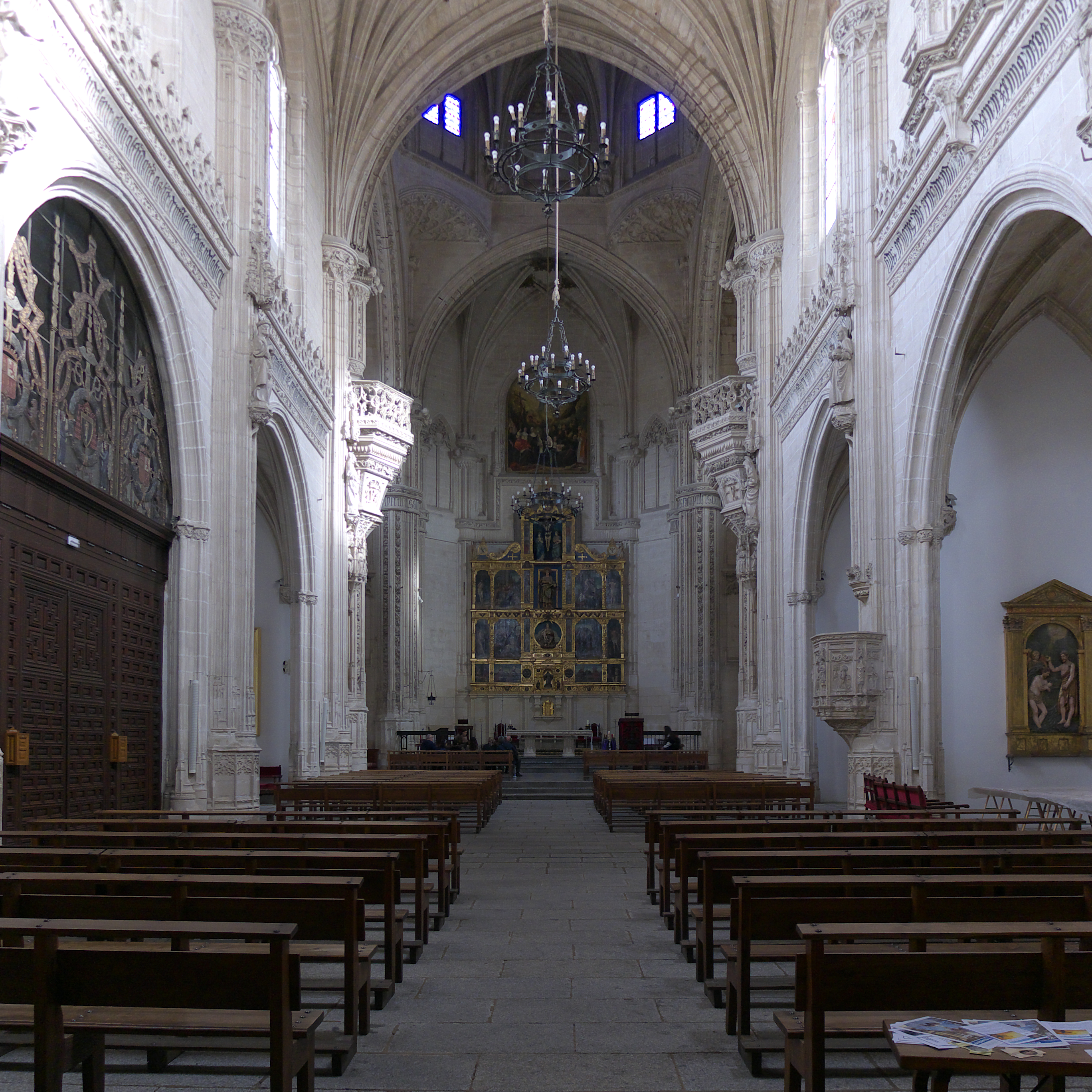 Iglesia de San Juan de los Reyes (1476-1495). Durante el reinado de los Reyes Católicos, Juan Guas alcanza con esta obra, el exponente mas conseguido del gótico hispanoflamenco.